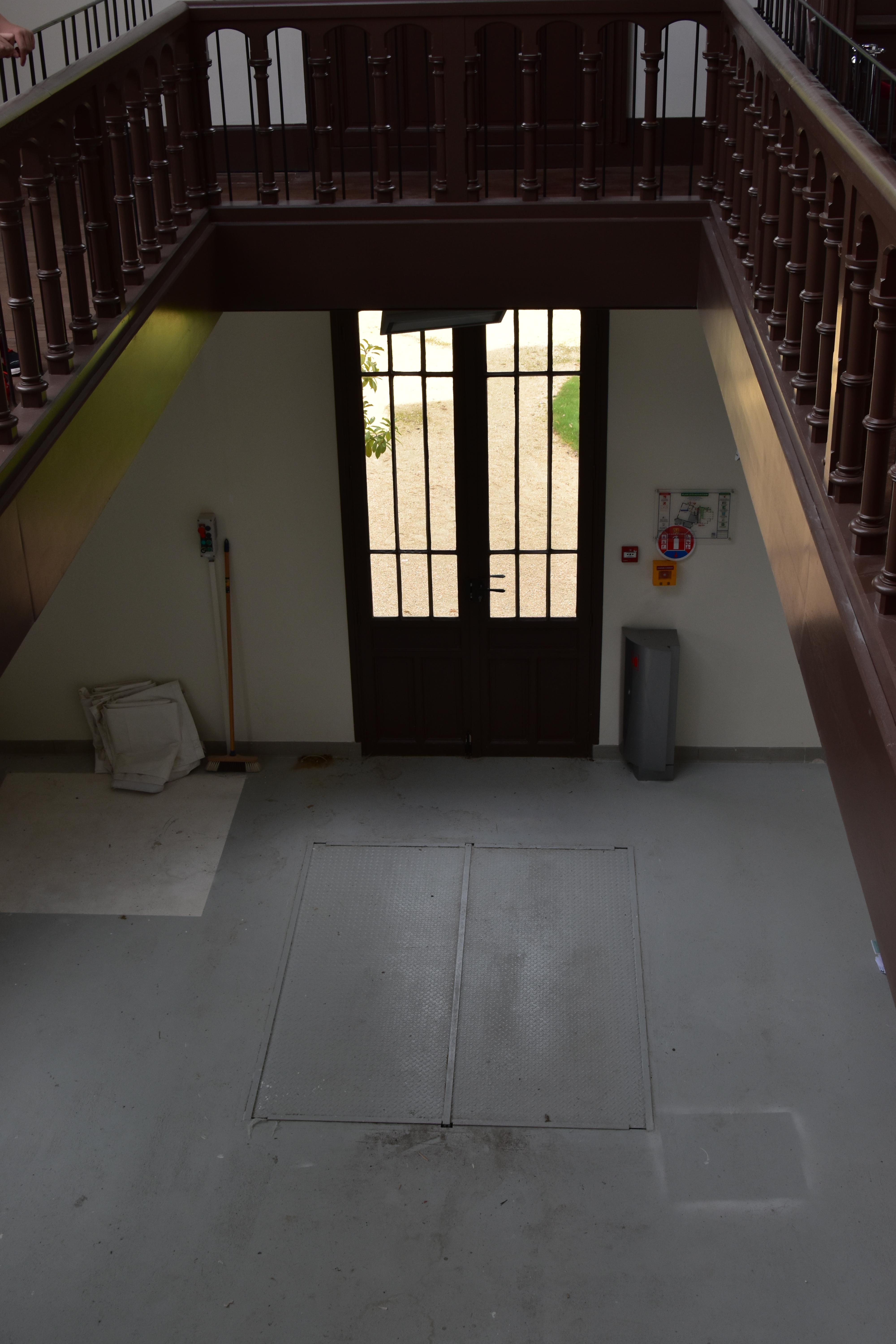 Vide du premier étage vers l'atelier du premier étage.